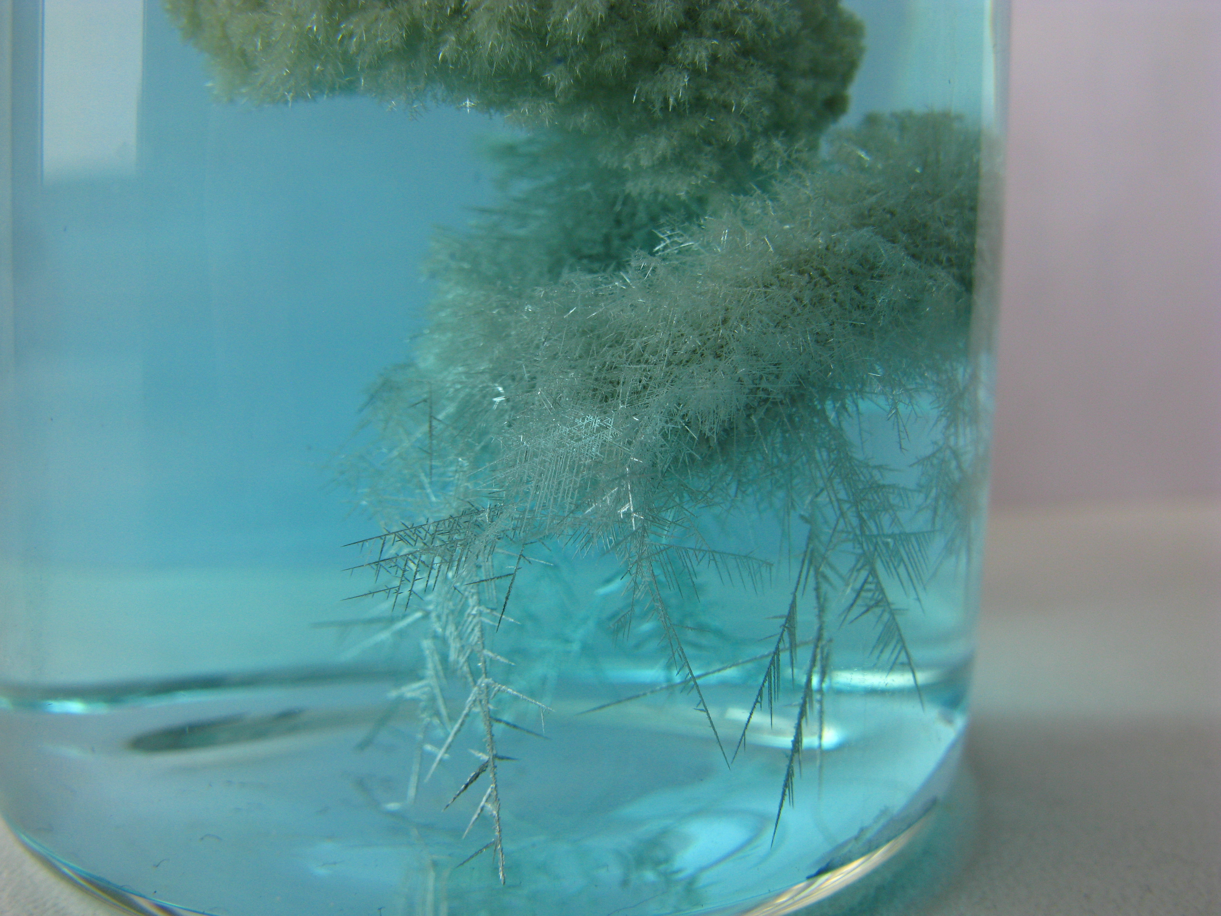 Arbre de Diane réalisé avec un fil de cuivre dans une solution de nitrate d'argent dans un bécher. Après 2 heures dans une solution à 0,1 mol/L, L'Abre est à un stade extrêmement avancé. Proche de l'effondrement, l'Arbre est très fragile. On voit nettement que la solution est maintenant bleutée : cela est dû aux ions Cu2+ apparus au cours de la réaction. Ici, gros plan dur les "racines" de l'Arbre, sa partie inférieure.